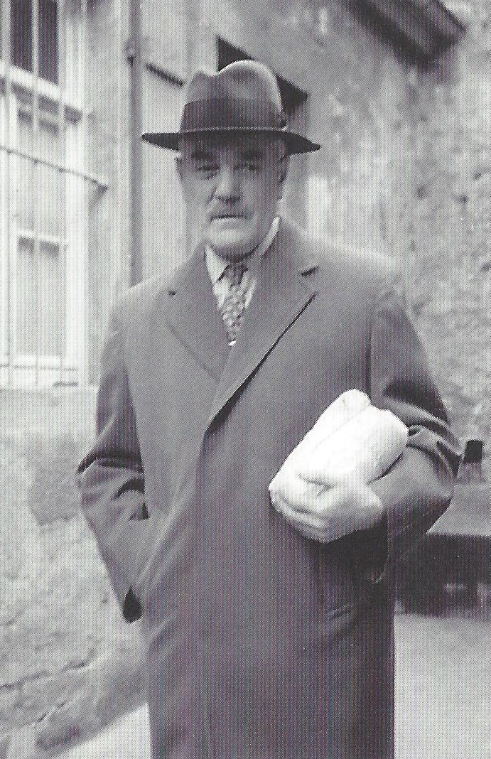 Fotografie des Corpsdieners von Saxo-Borussia Heidelberg